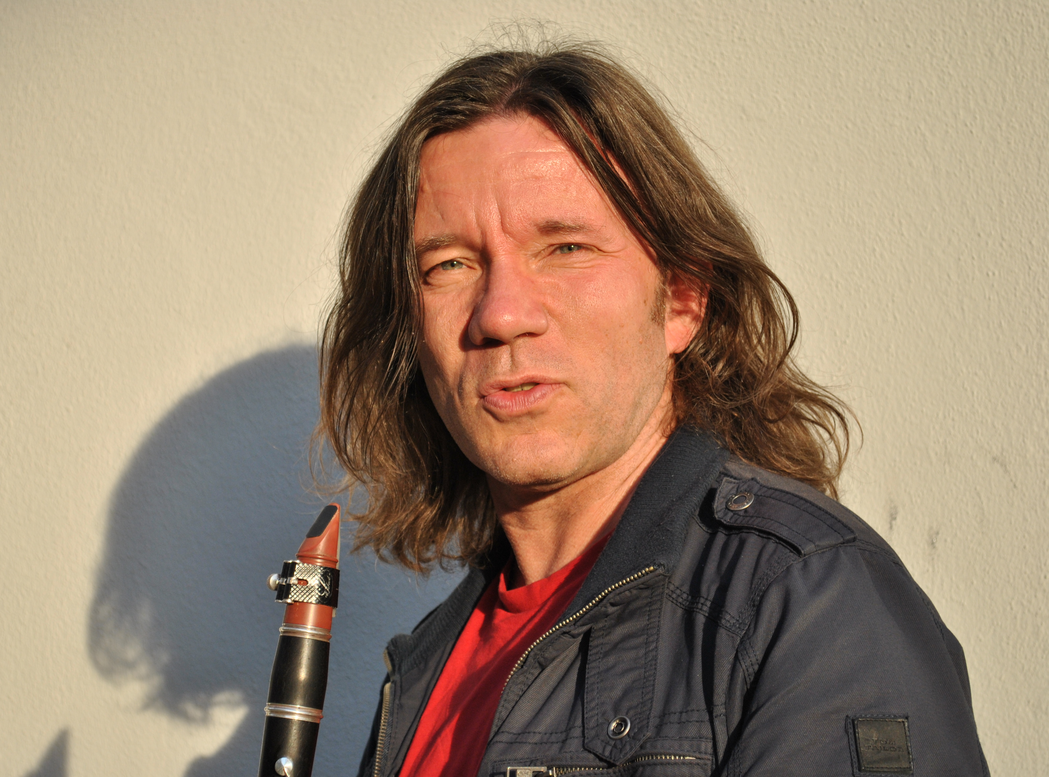 Klarinettist